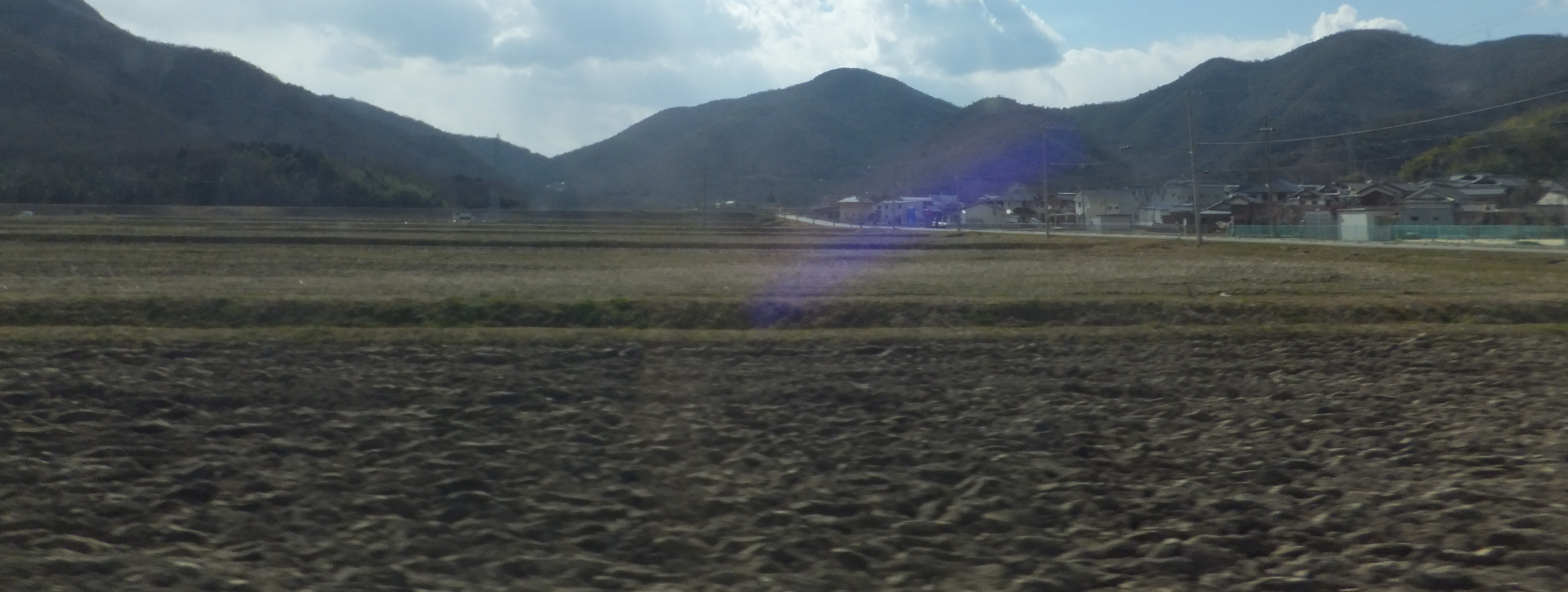 シーズンオフの馬場コスモス畑